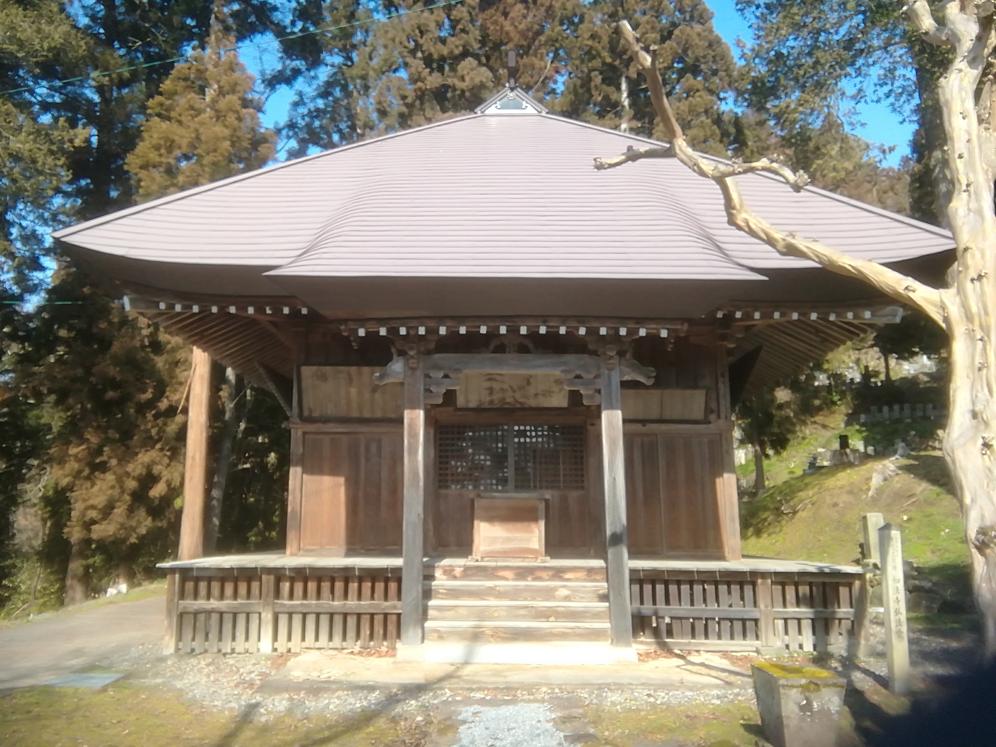 妙法寺弘法堂